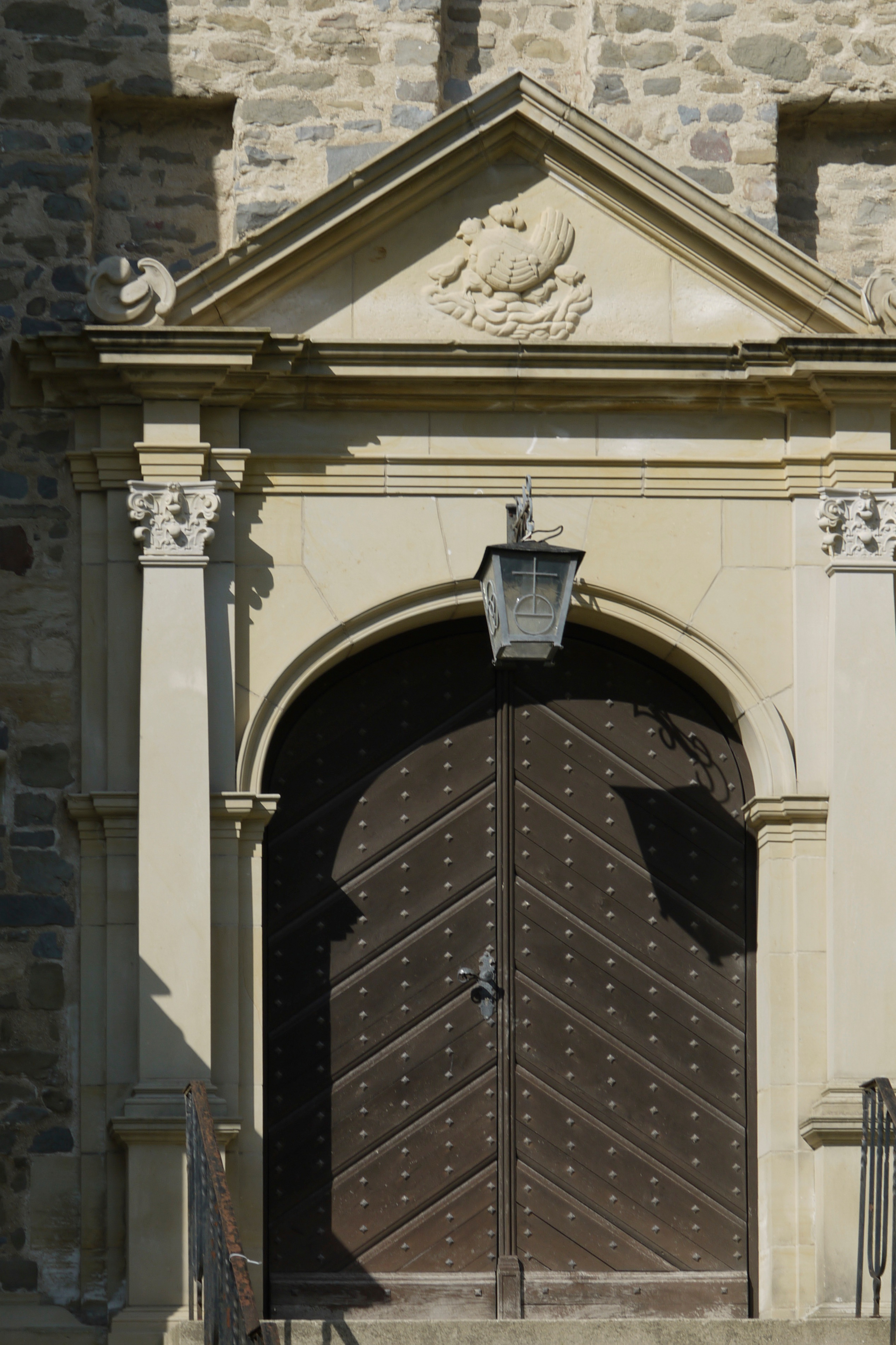 Südlicher Eingang der St.-Salvatoris-Kirche in Zellerfeld. Im Dreieck über der Tür das Relief einer Henne mit ihren Küken